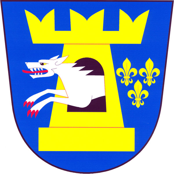 Znak obce Nemyslovice